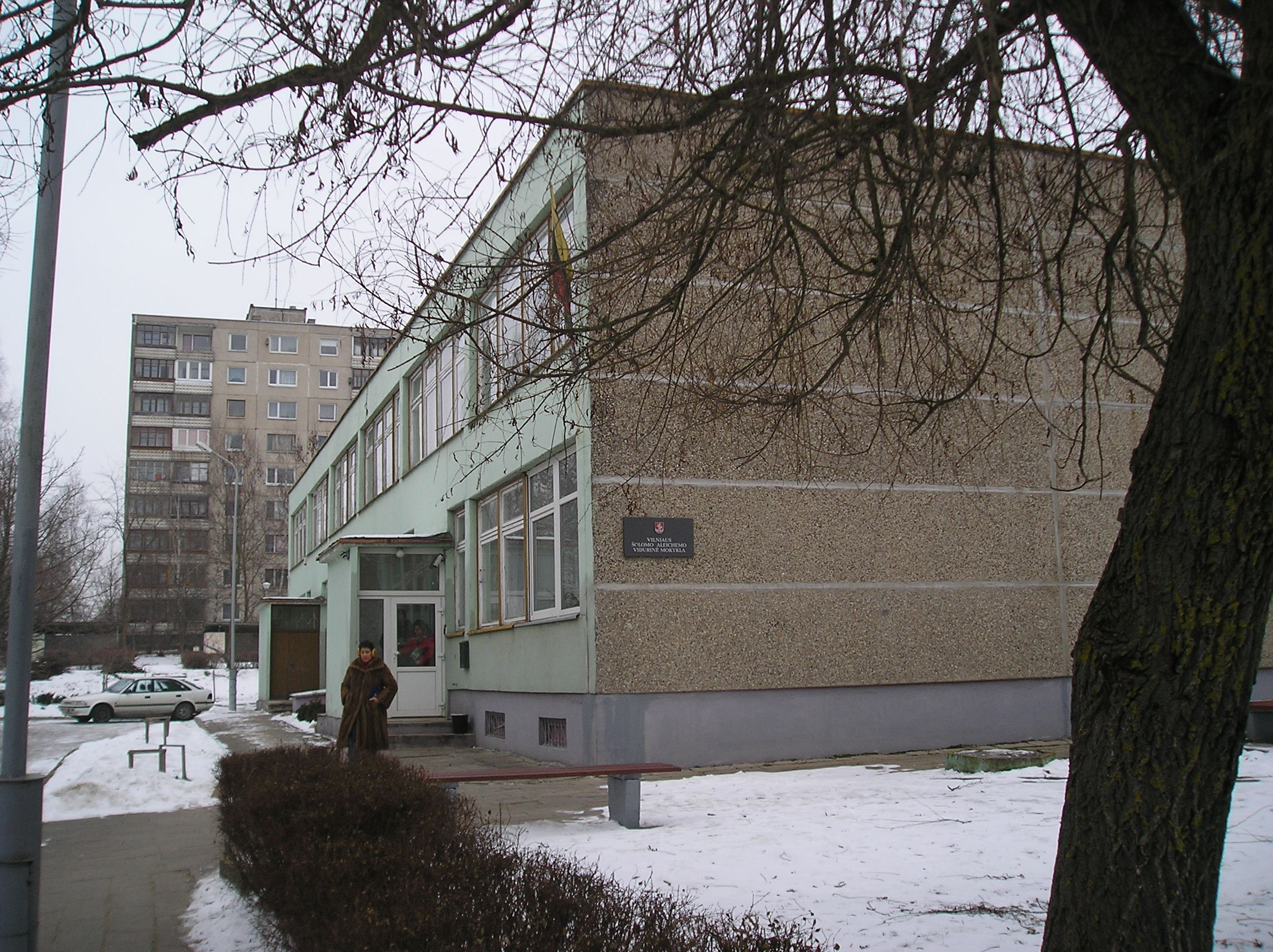 Šolom Aleichemo vidurinė mokykla